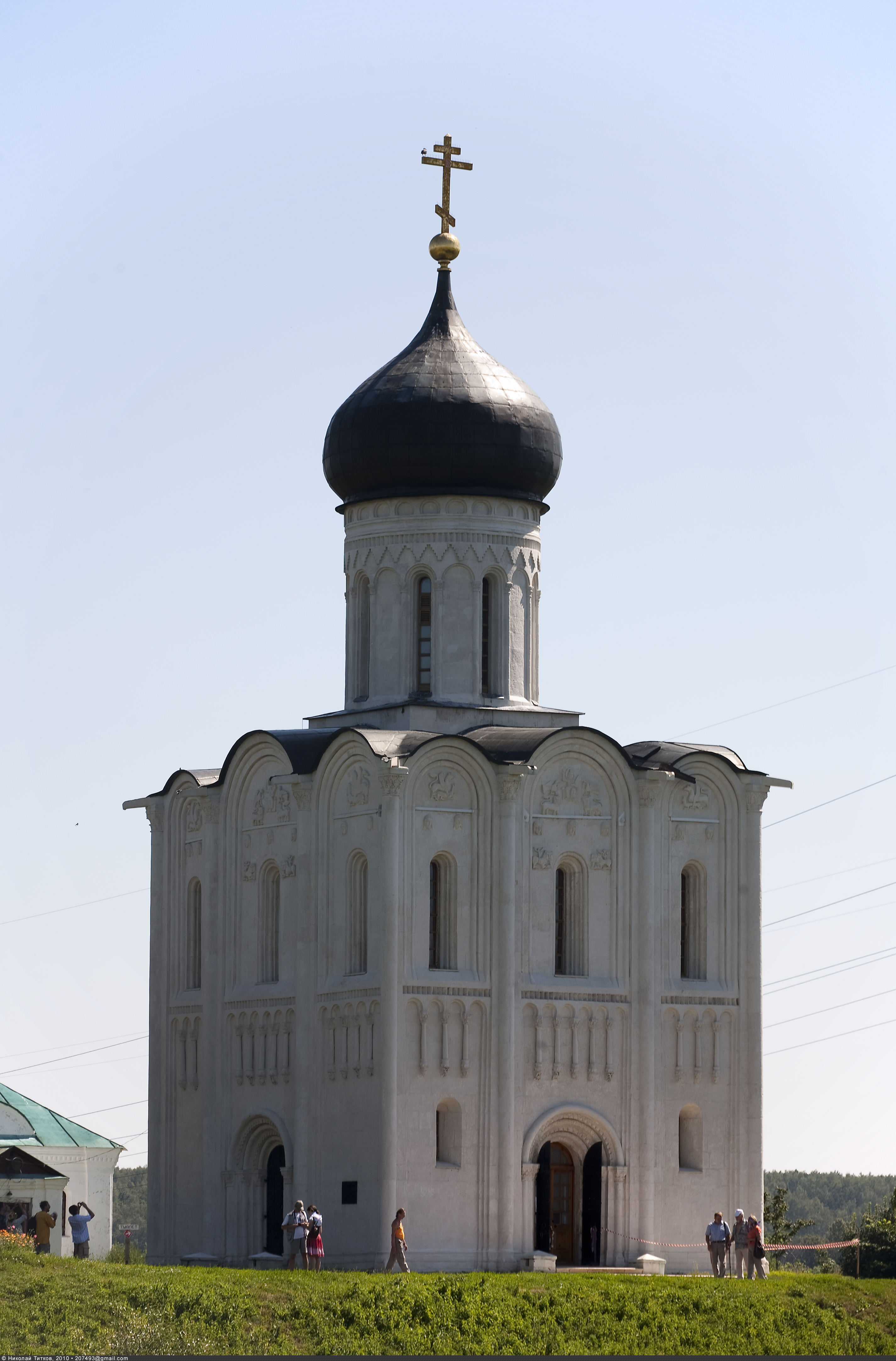 Покров на Нерли — четырёхстолпный, трёхапсидный, одноглавый храм, построенный из белого камня высочайшего качества (кладка весьма однородна, в ней практически отсутствует желтоватый оттенок, пористость блоков очень низка). В сводах для их облегчения применён туфообразный известняк. Храм стоит на уникальном фундаменте, состоящем из восьми рядов качественного гладкотёсаного белого камня (в целом около 4 метров глубиной), базирующихся на обычной для суздальского зодчества бутовой основе, почти квадратной в разрезе (глубиной около 2 метров). Дата постройки — 1165 год — оспаривается многими исследователями.